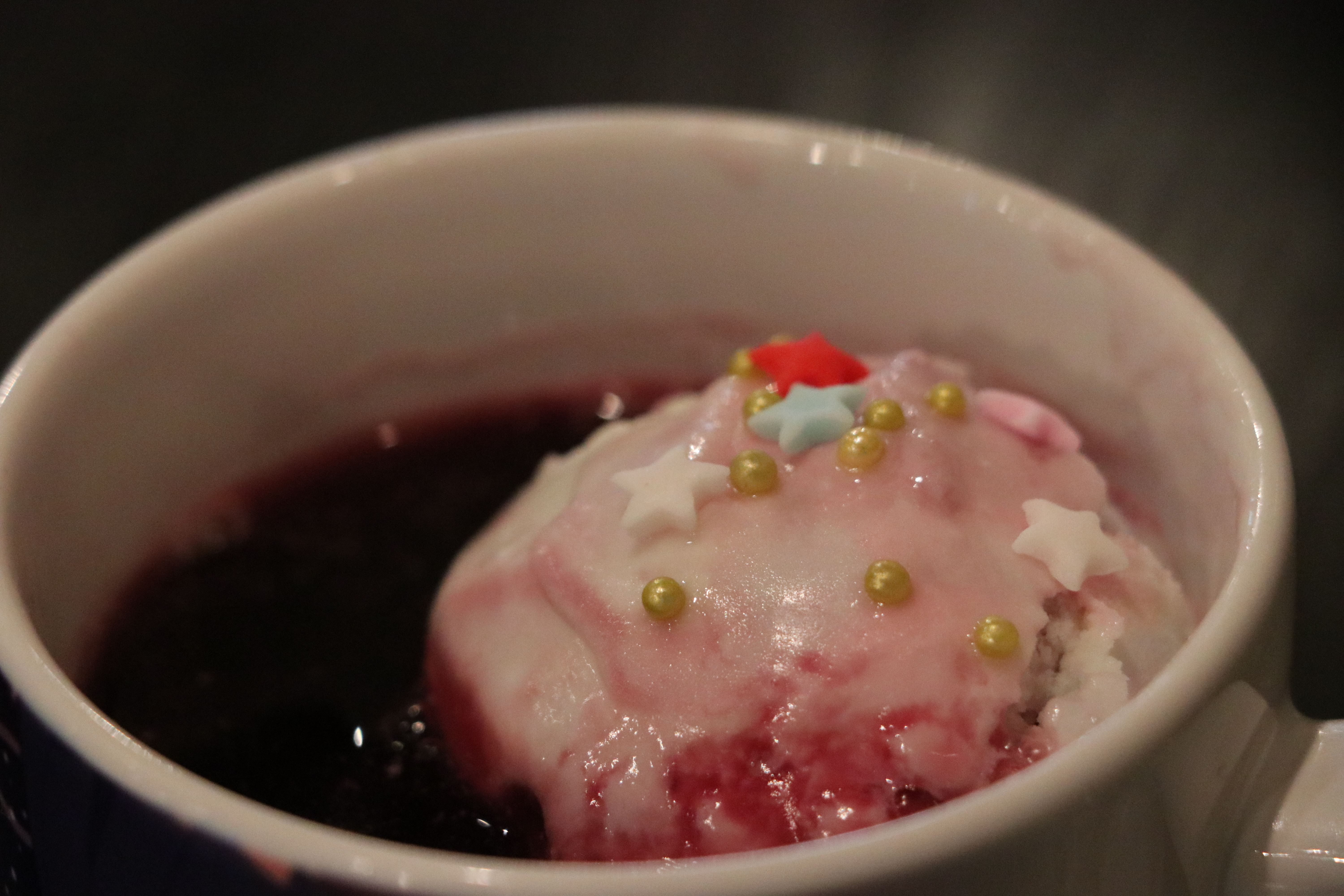 恋する小惑星とのコラボカフェで提供された「KiRA KiRA ドリンク」。ぶどうジュースの上にバニラアイスを添えた飲料